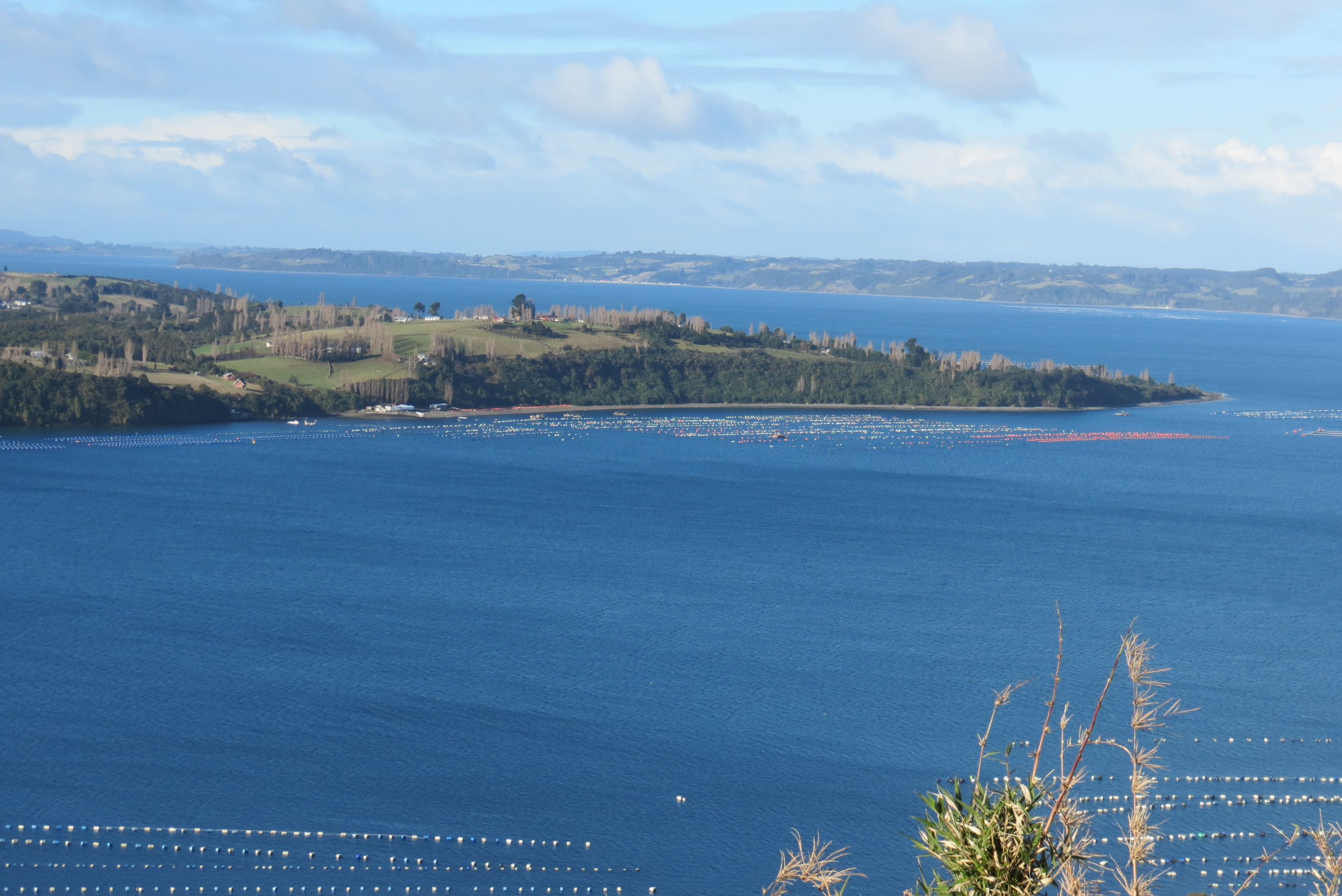 Punta de Tutil, uno de los extremos de la península de Rilán, en la comuna de Castro, archipiélago de Chiloé, Chile. Al fondo, isla Lemuy. Foto tomada desde Tauco, en la comuna de Chonchi.